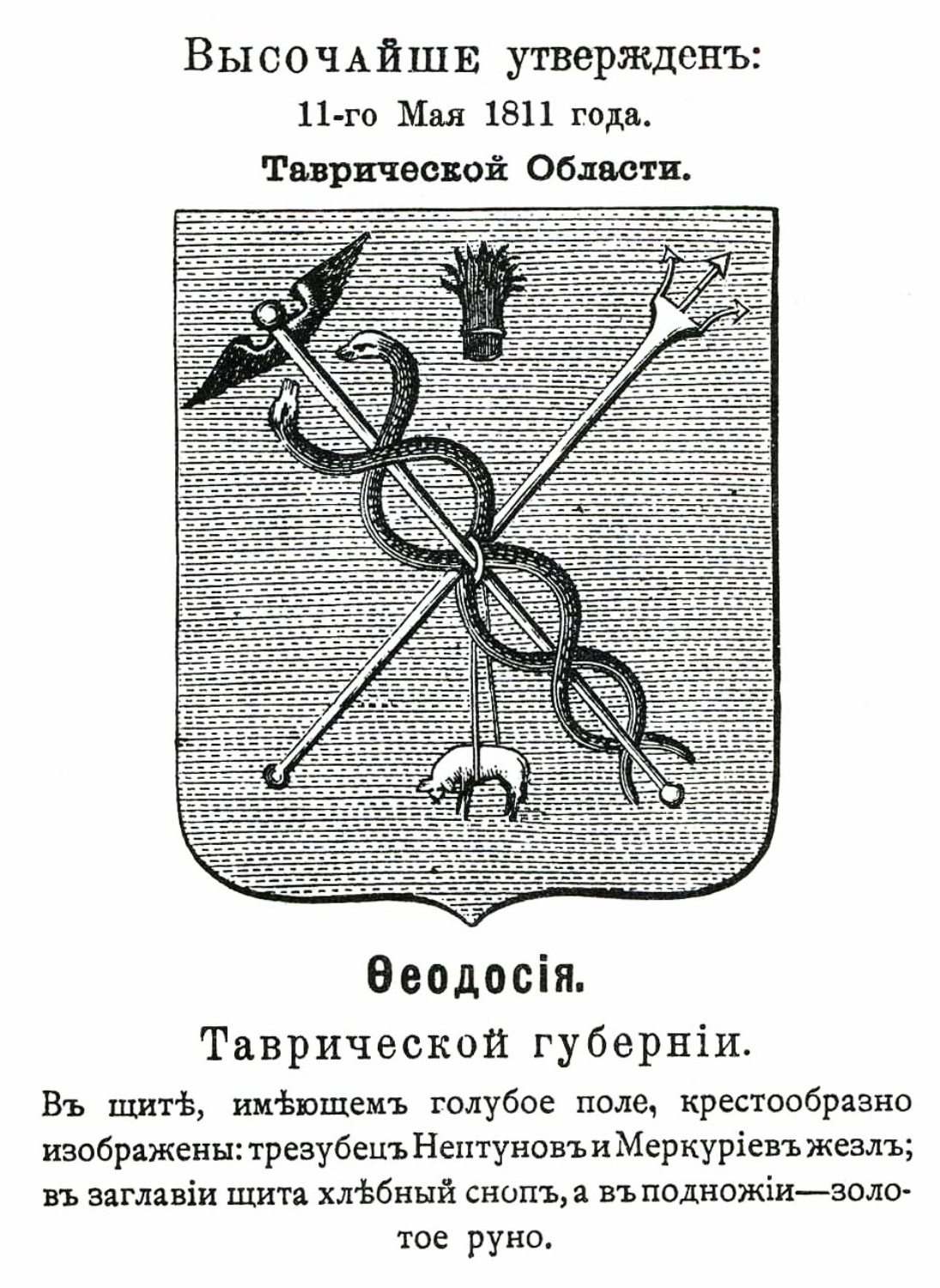 Official Russian Empire coat of arms Feodosia. Герб города Российской Империи Феодосия Таврической области 1811 года с официальным описанием в Гербовнике Винклера.